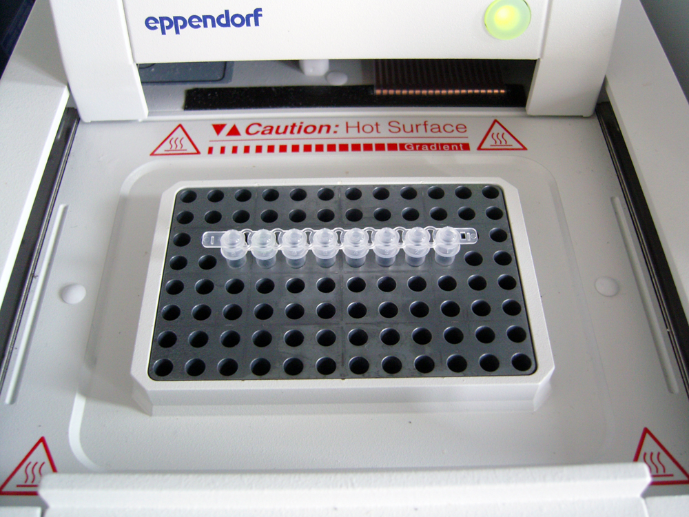 Geöffneter Thermocycler mit 8 PCR-Reaktionen